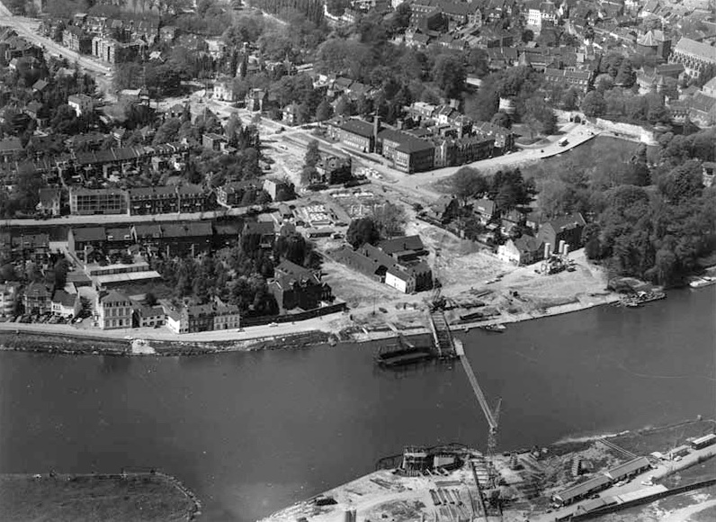 Luchtfoto van de Maas in Maastricht ten tijde van de bouw van de John F. Kennedybrug in 1966. Voor de bouw van de brug was het noodzakelijk meerdere huizen aan de Blekerij af te breken. Aan de Parkweg, de Sint Pieterskade en de Prins Bisschopsingel moesten eveneens huizen worden gesloopt. Fotocollectie RHCL Maastricht, GAM 15240.